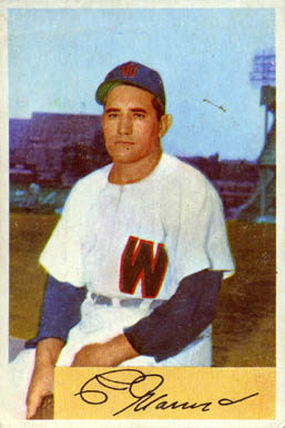 Connie Marrero